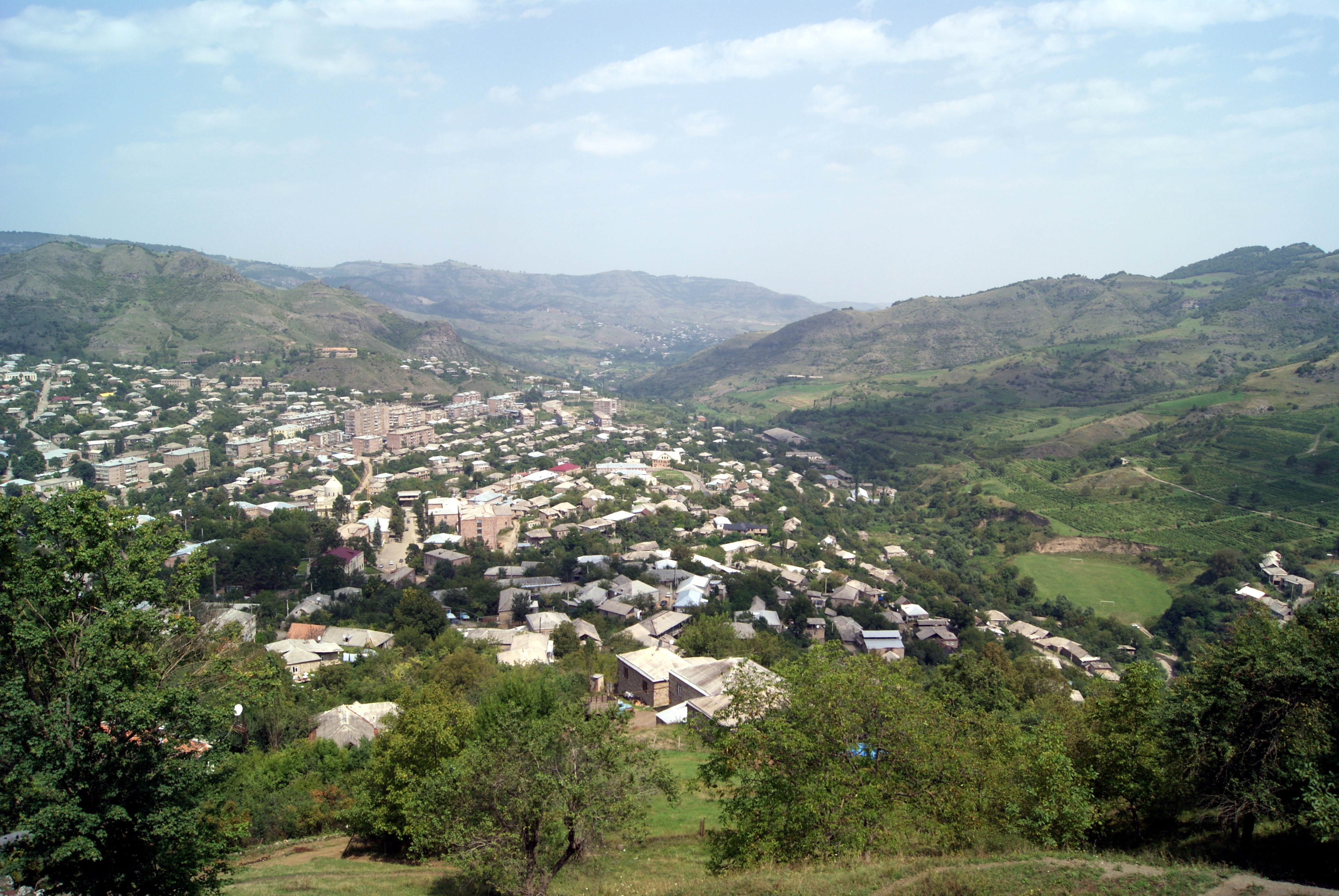 Բերդ, Տավուշ